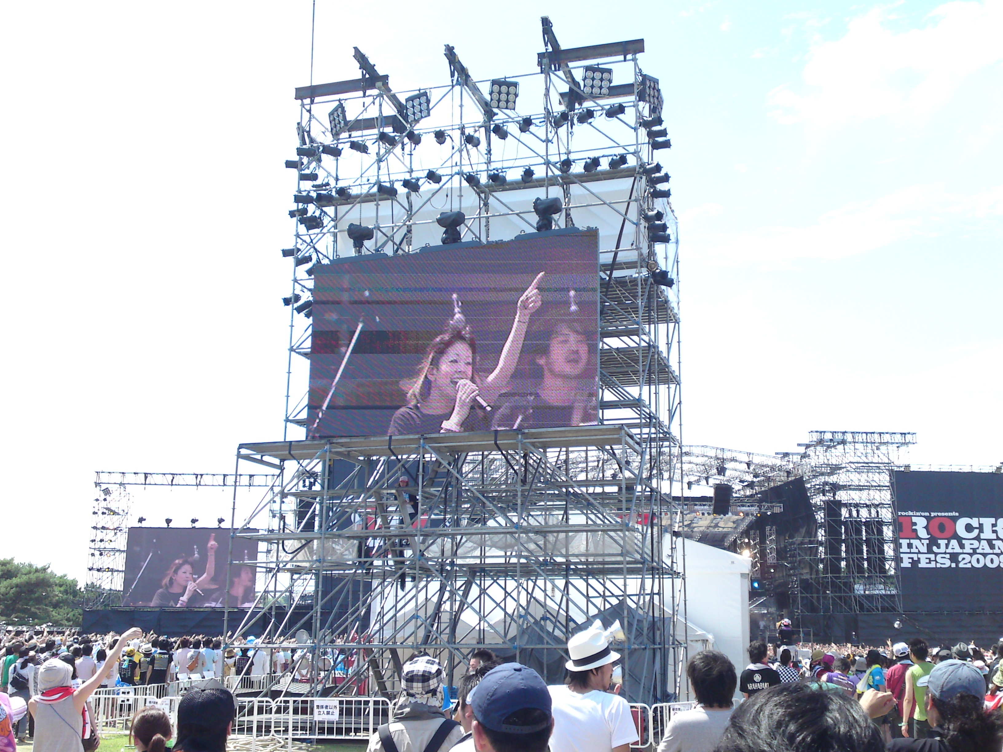 木村カエラ